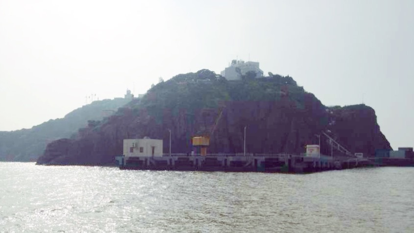 上海市崇明县佘山岛